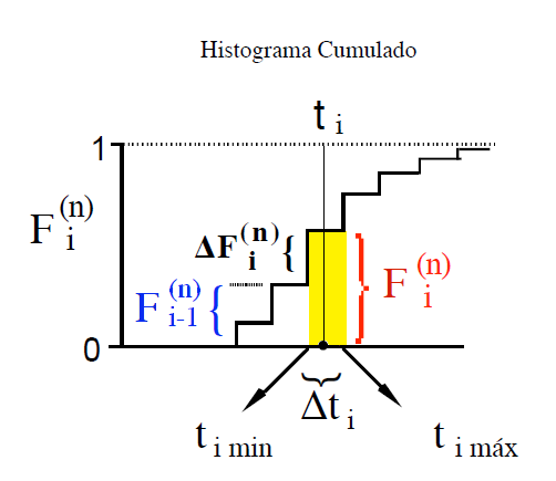 Ilustracióm de un histograma cumulado